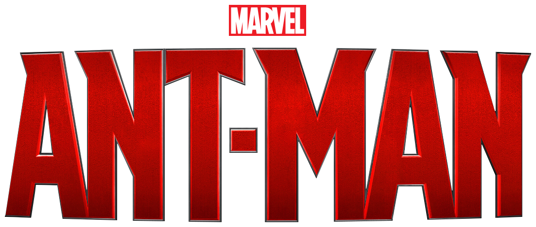 Ant-Man (Film) Logo